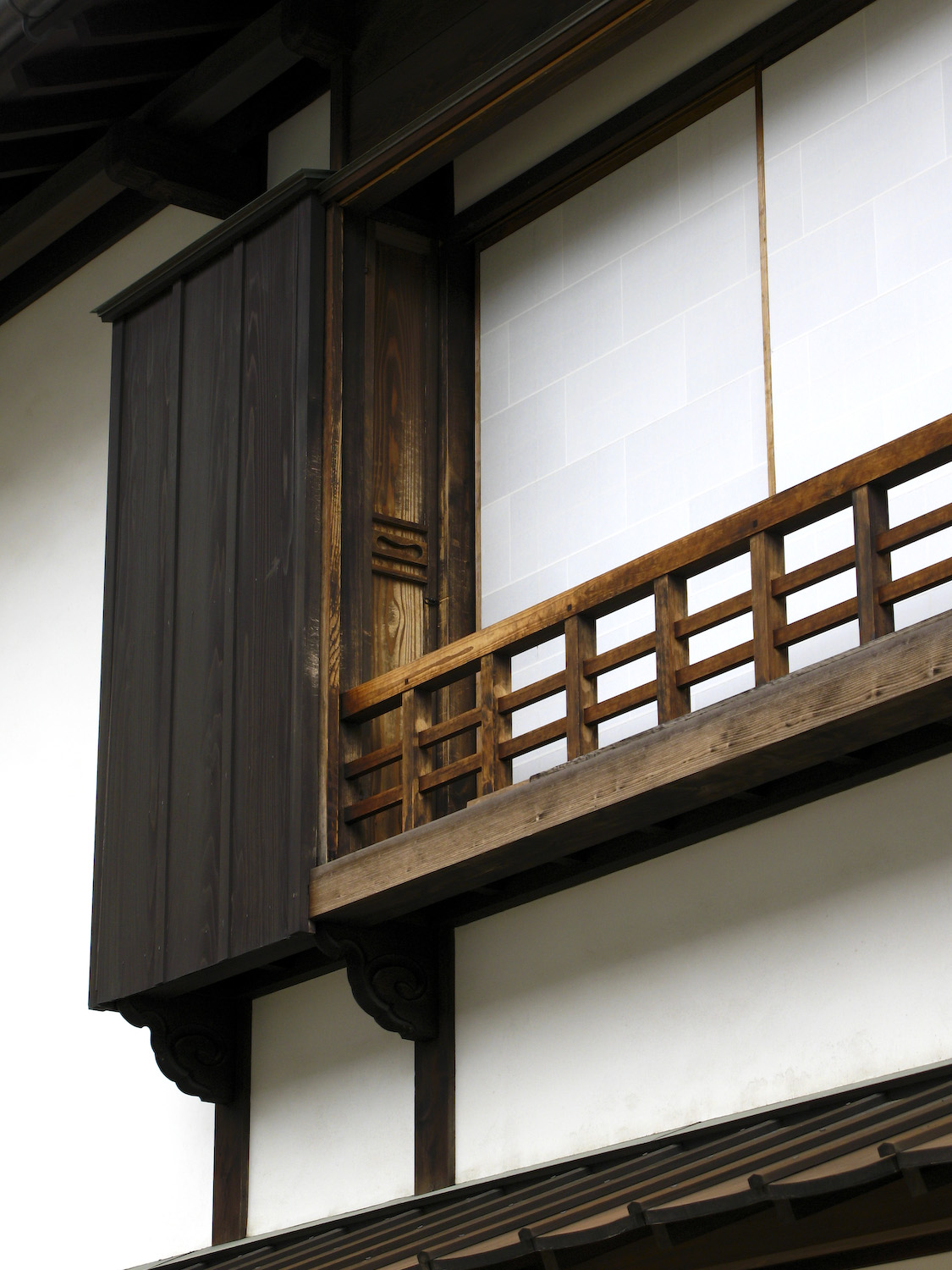 Dejima (reconstruction). Nagasaki, Japan.